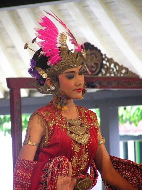 A dancer during performance. Photo taken in Yogyakarta, Indonesia.